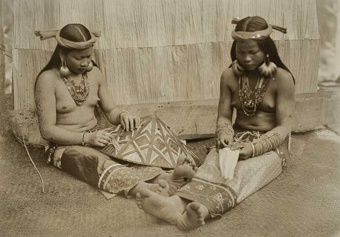 Foto. Deze foto is gemaakt tijdens de Commissiereis naar Centraal-Borneo van A.W. Nieuwenhuis. Dajak vrouwen tijdens het vlechten van een zonnehoed en het rijgen van een sawit, Boven-Mahakam